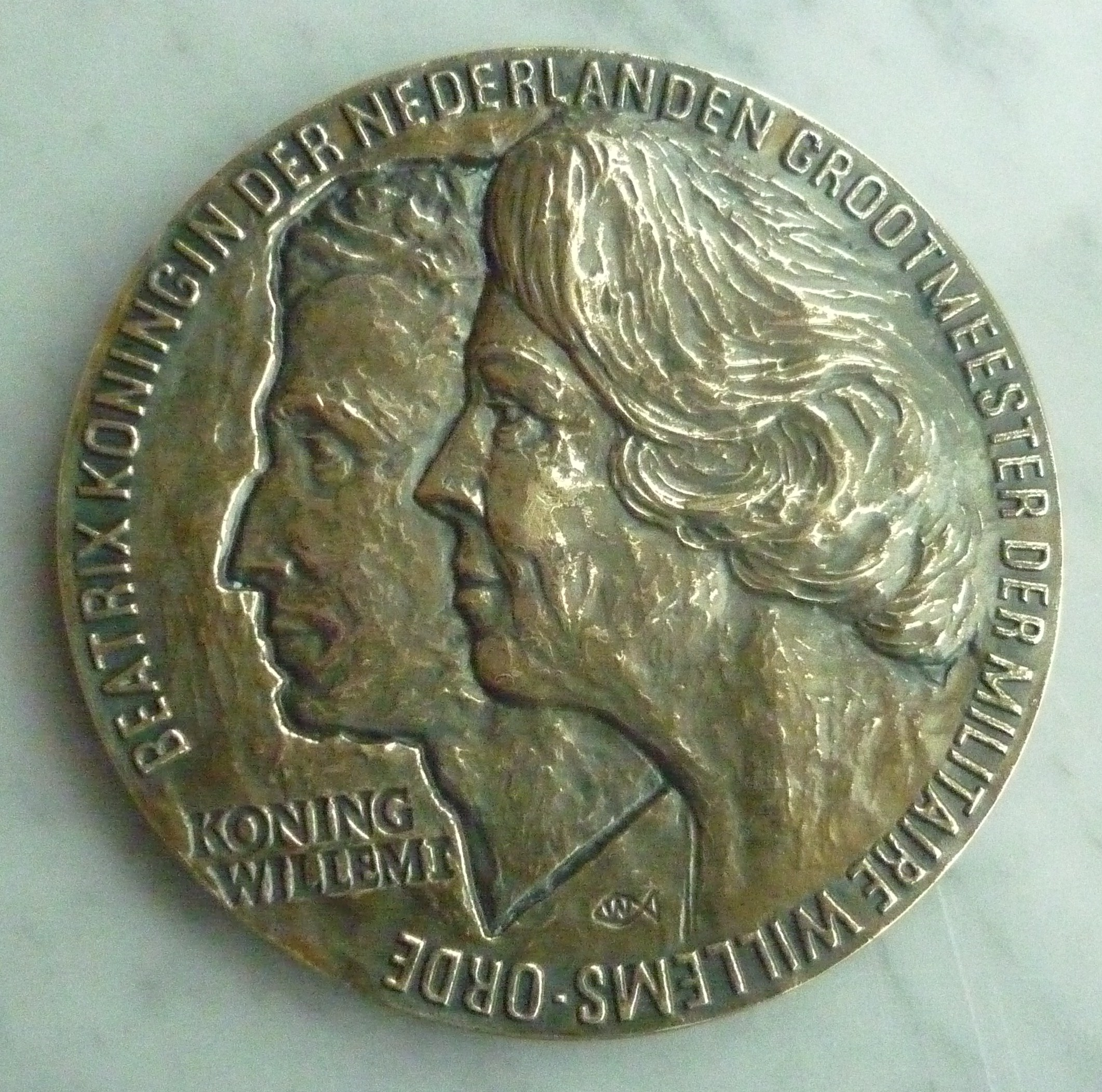 penning 175jarig bestaan van de Militaire Willems-Orde